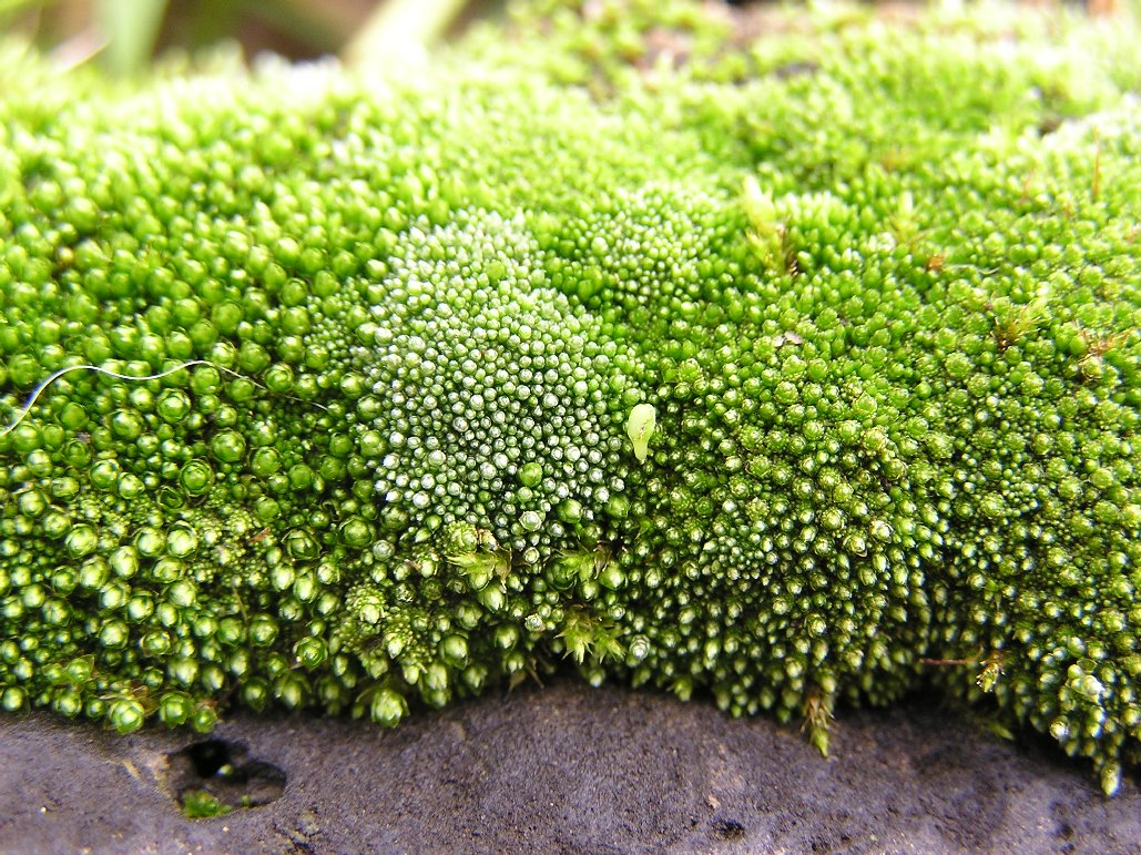 Bryum argenteum und Bryum capillare auf einer Mauerkrone in Bonn.